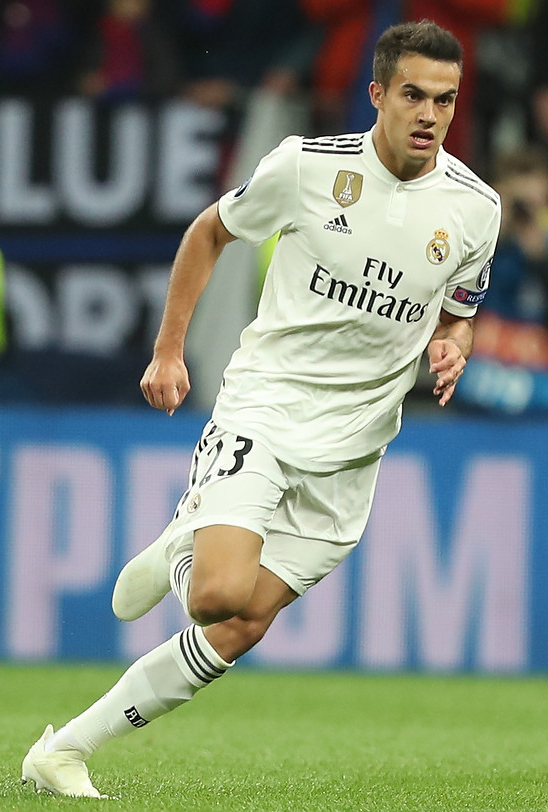 ЦСКА бьёт «Реал» при полных «Лужниках»